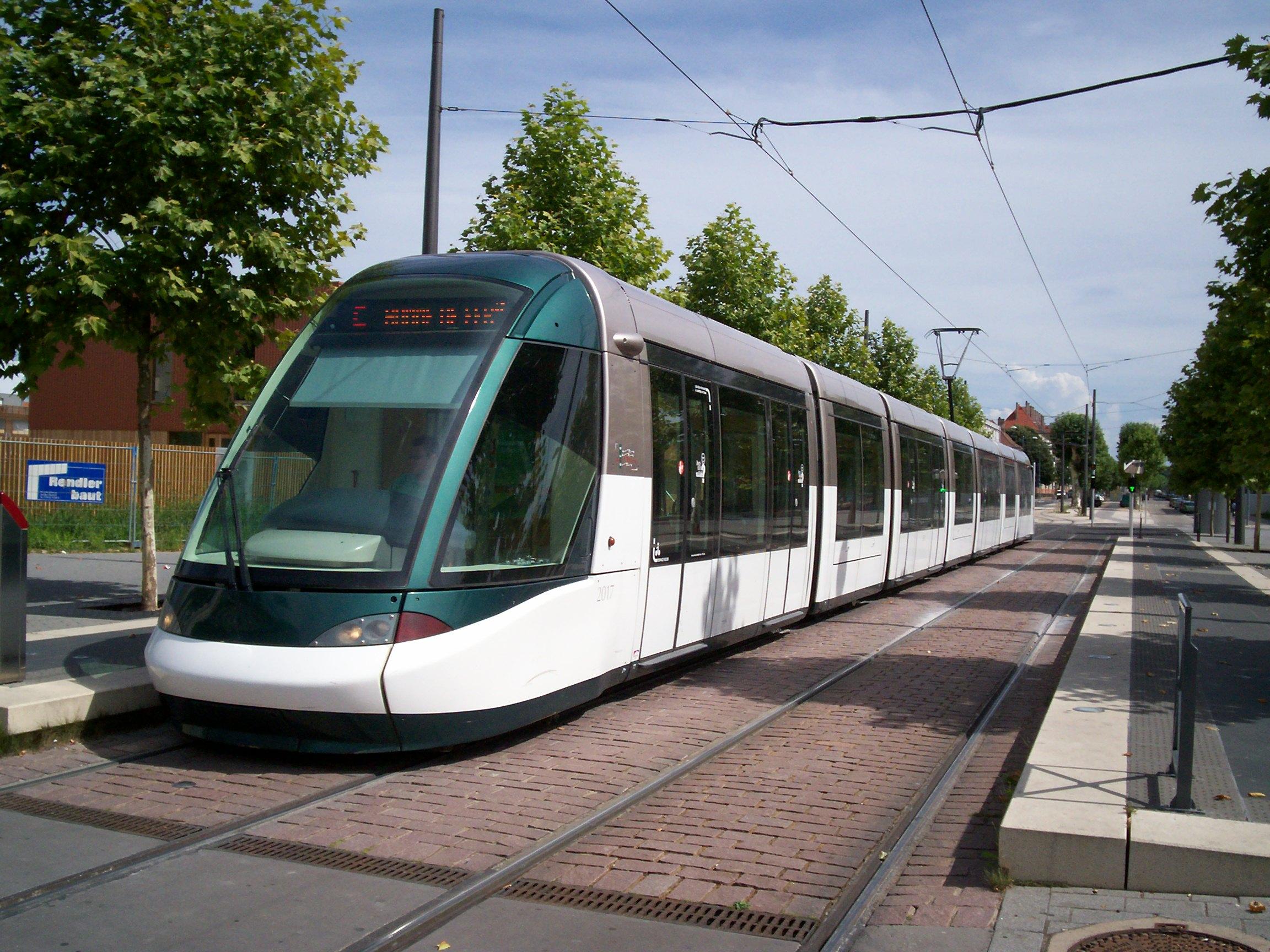 Tramway de Strasbourg Ligne C